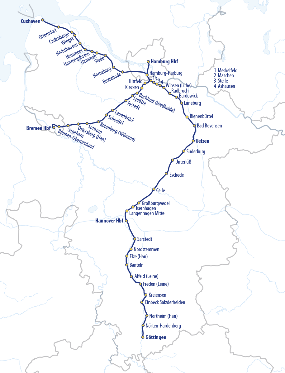 Liniennetz der Metronom Eisenbahngesellschaft bis 8. Dezember 2018